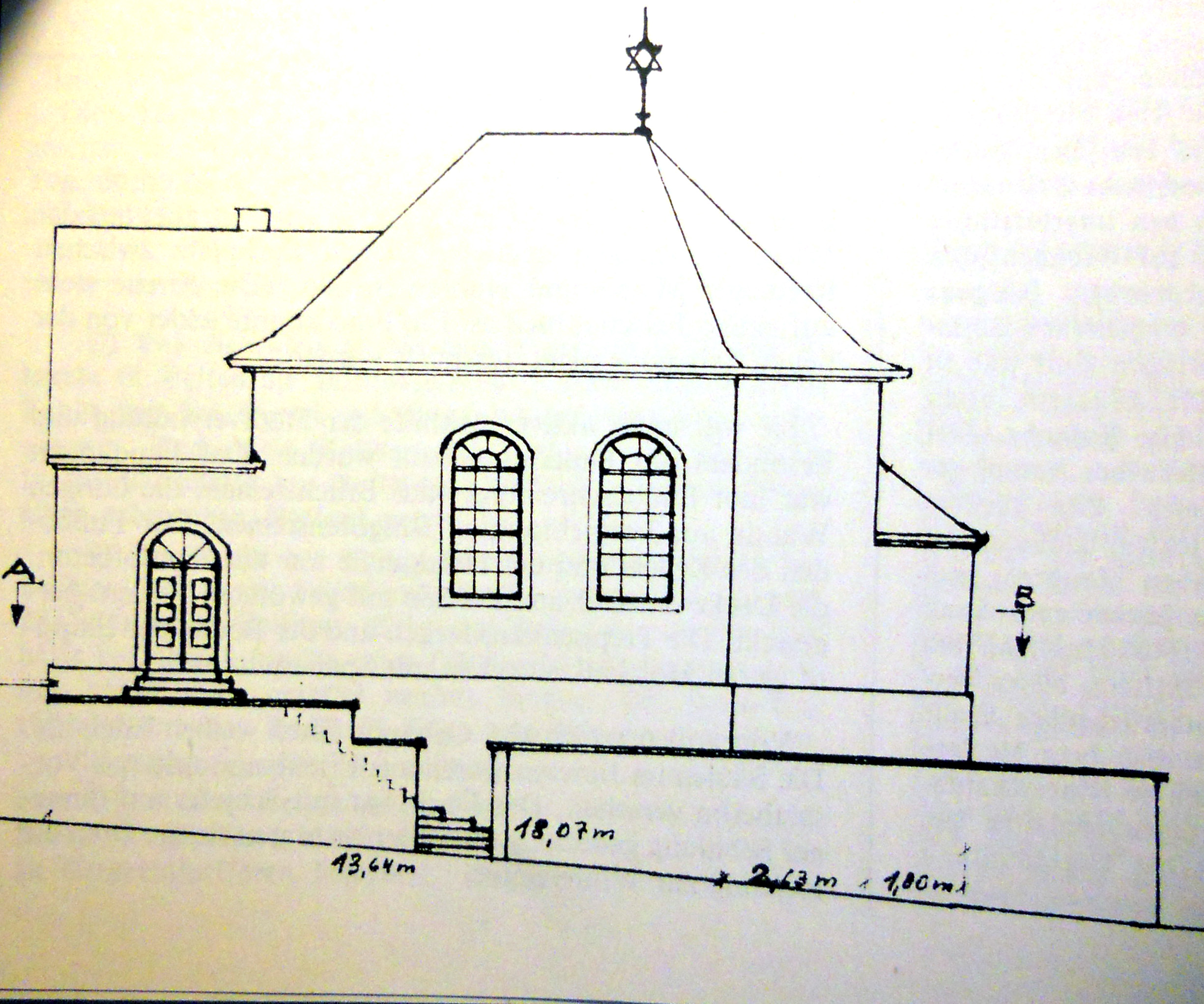 Synagoge in Brilon Endgültige Ausführung